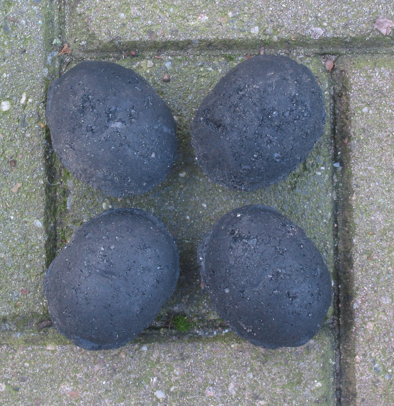 eierkolen) ovoids (coal